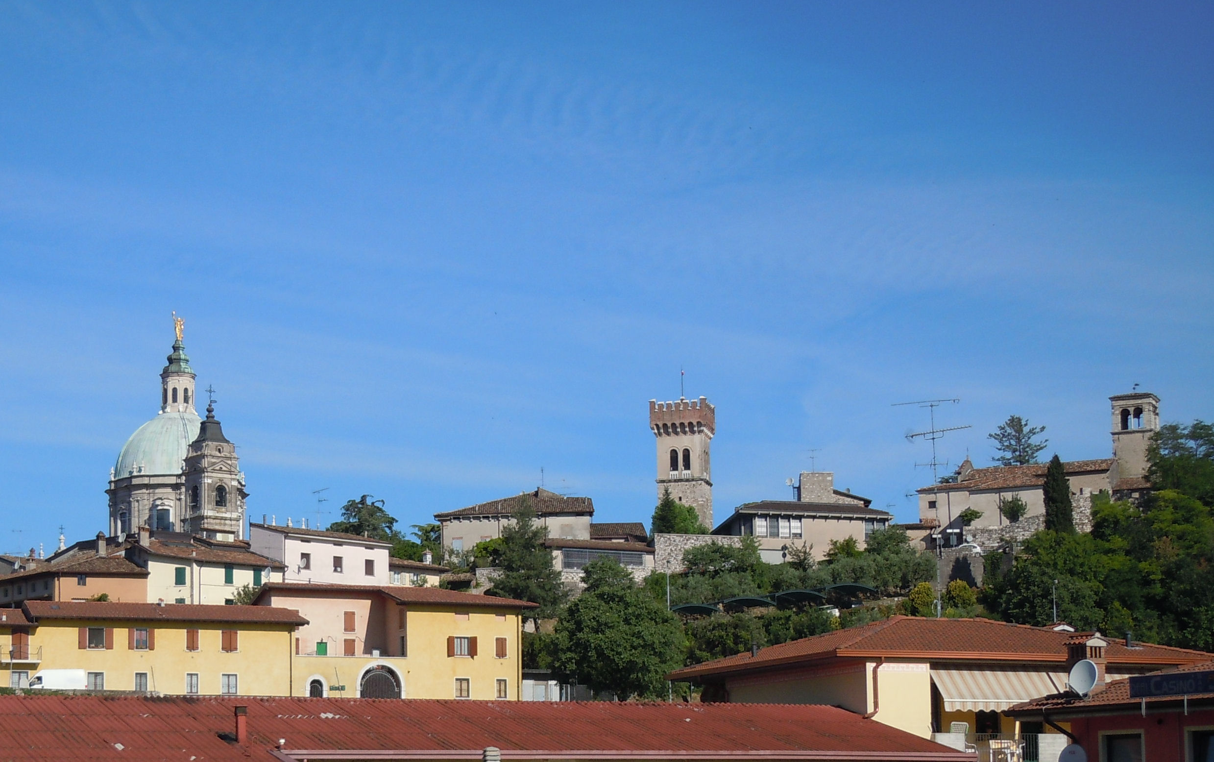 Lonato del Garda, panorama.